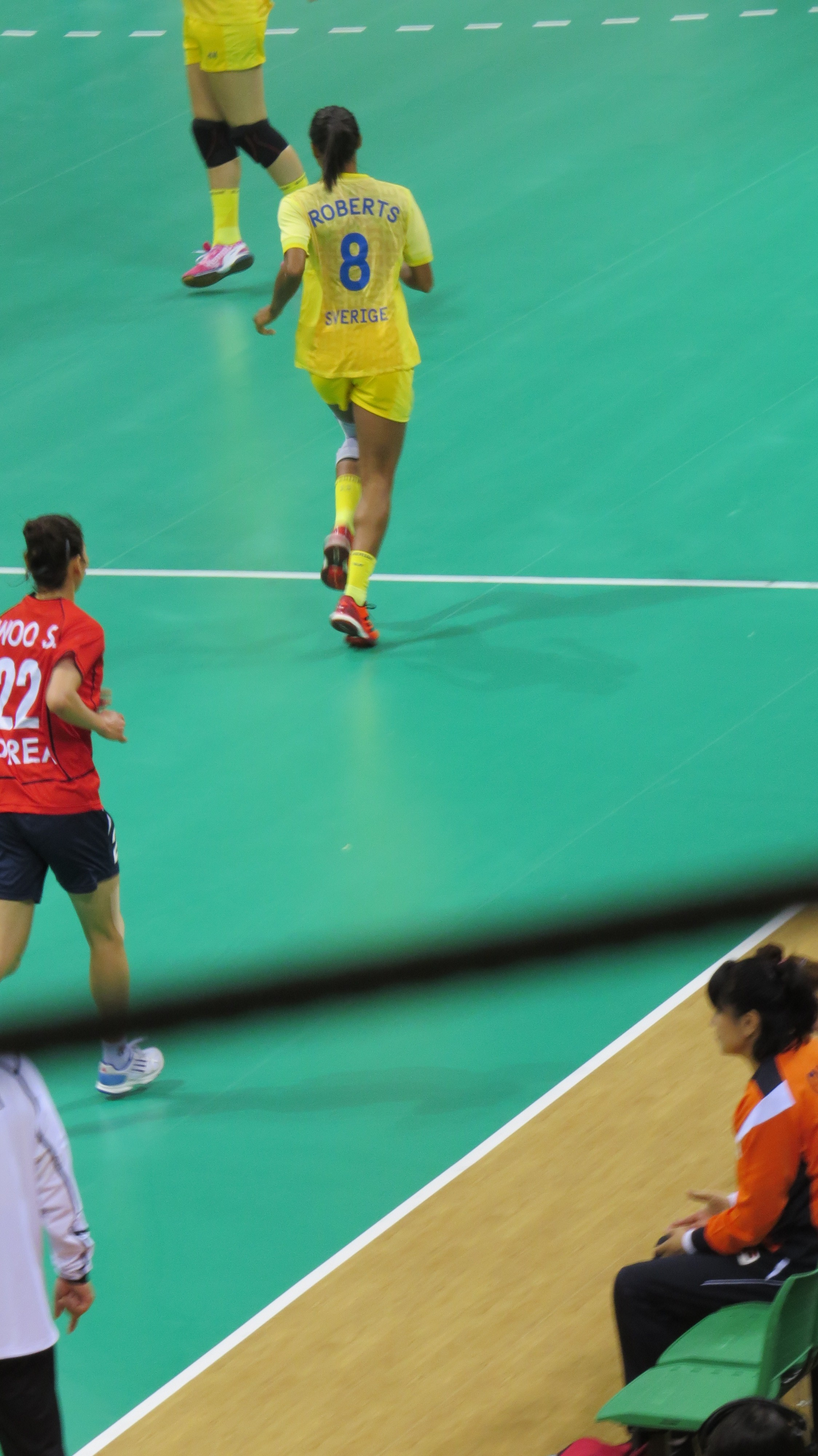 Rio 2016. sx 15